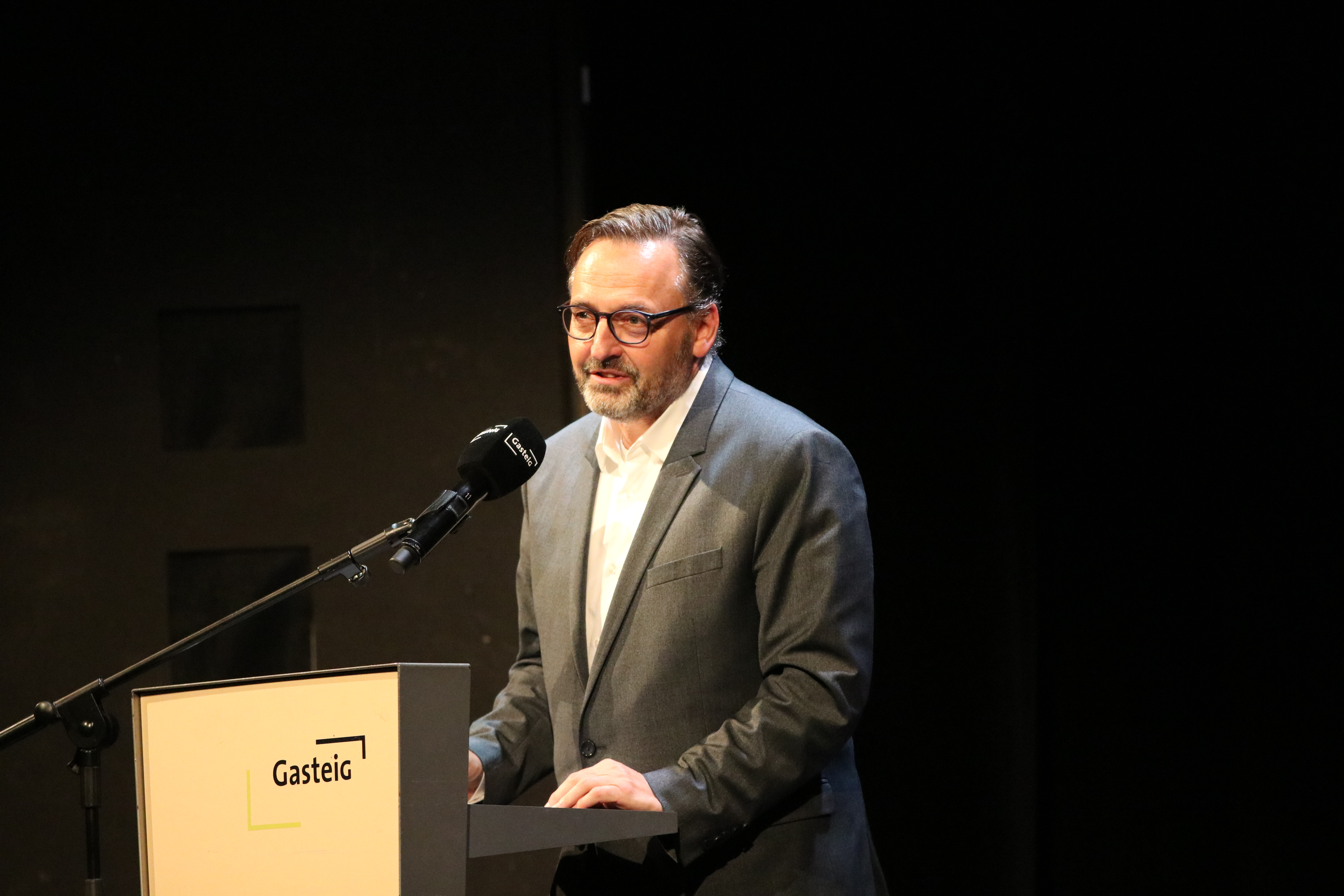 Anton Biebl, Kulturreferent der Stadt München, bei der Eröffnung des Münchner Literaturfests 2019